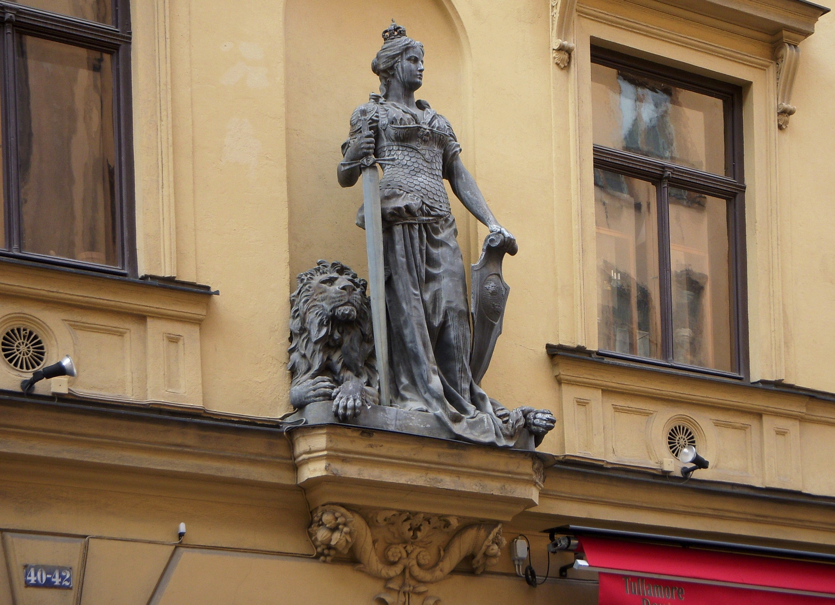 Stockholms Enskilda Bankens byggnad i Gamla stan